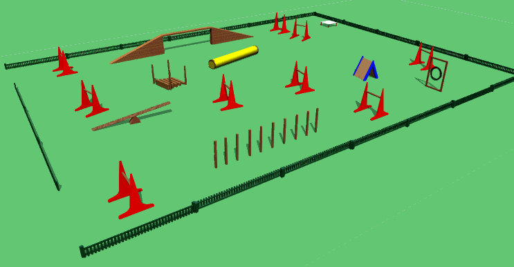 Agility Partur